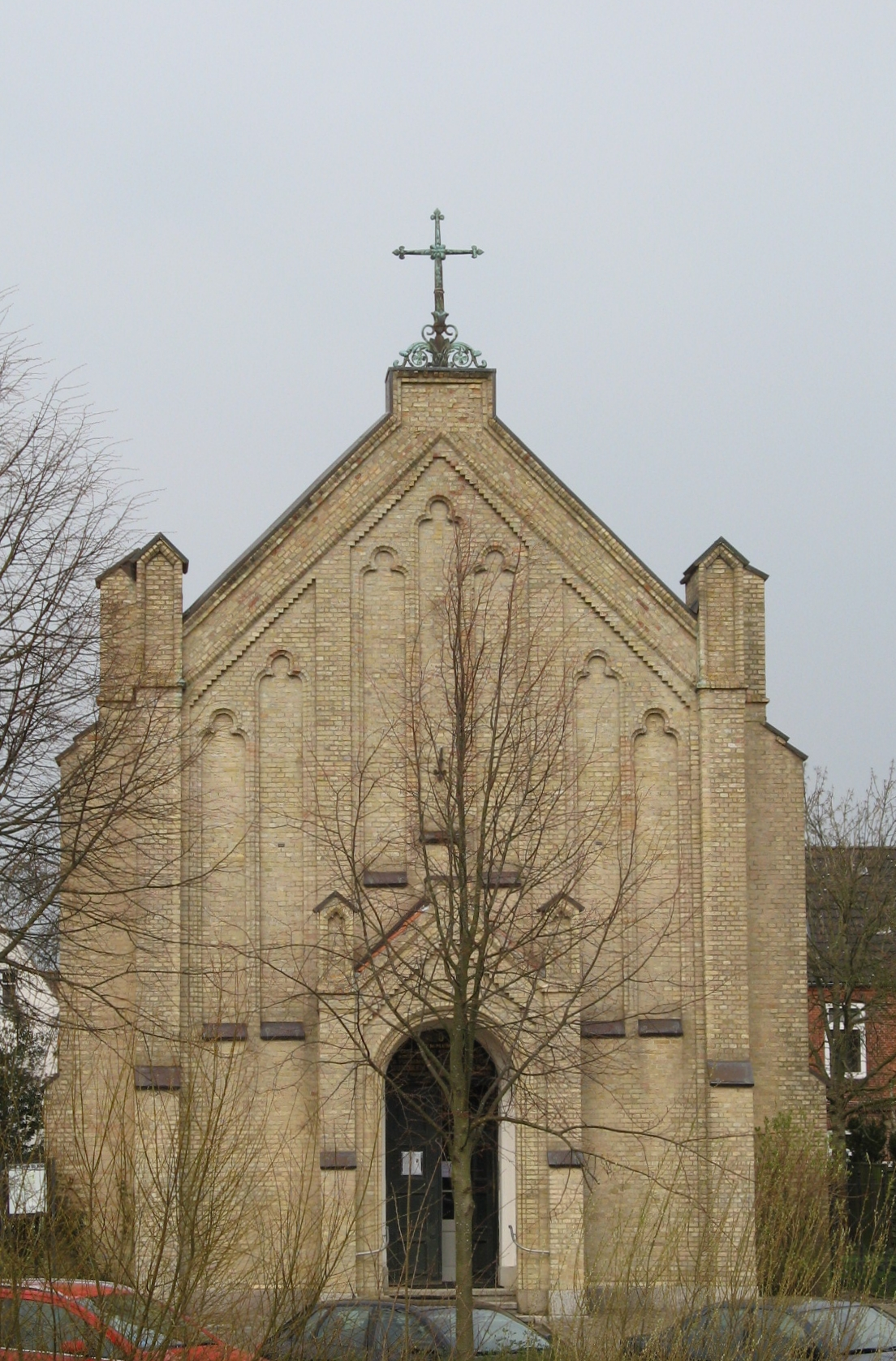 catholic saint knud church in Friedrichstadt Author: Dirk Ingo Franke